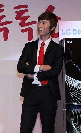 2012년 9월 21일 서울 소공동 플라자호텔에서 개최된 ‘LG 디오스 김치톡톡쇼’ 행사에서 CF 모델로서 출연한 양상국